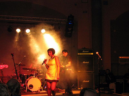 Klasse Kriminale